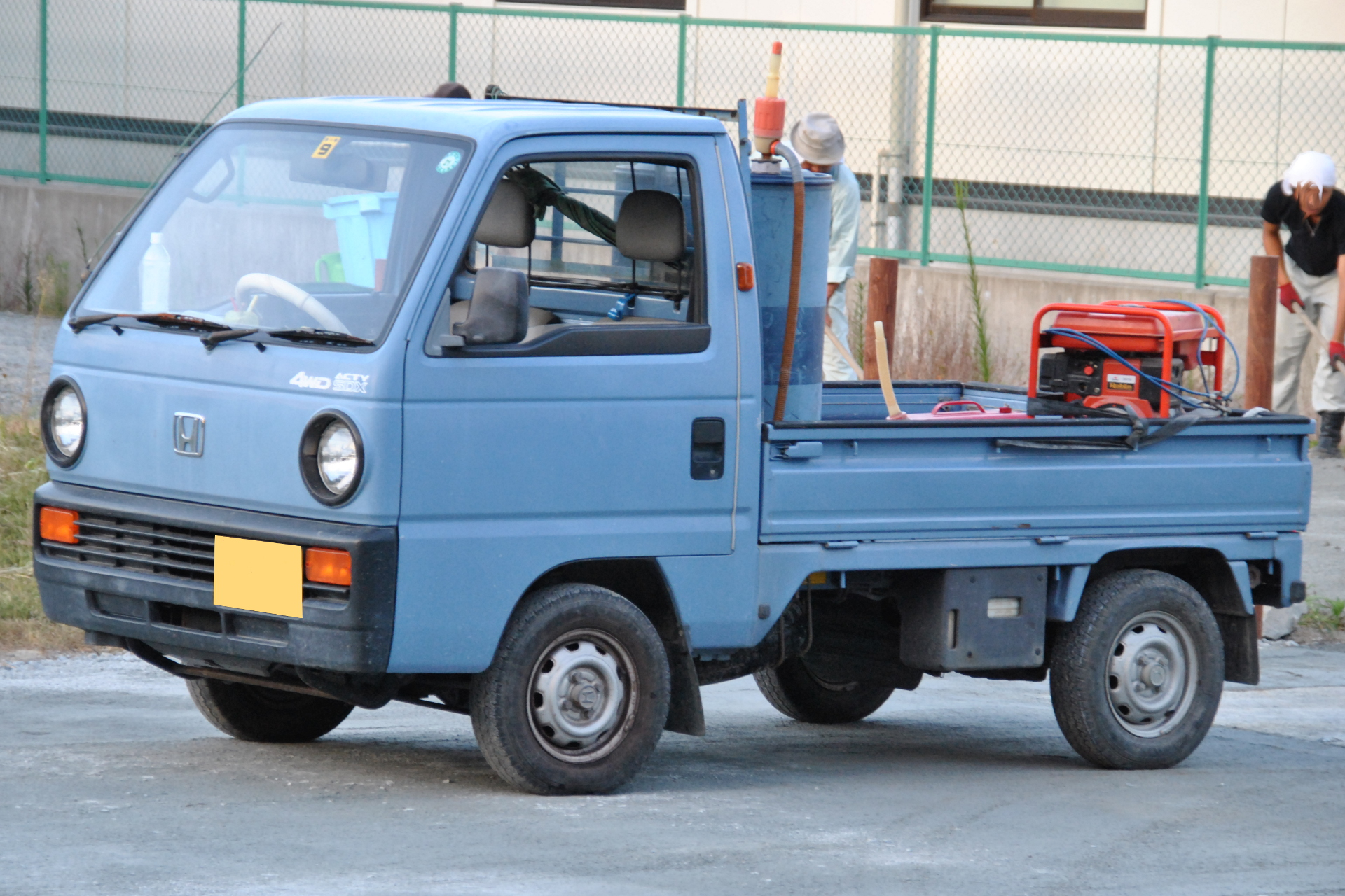 ホンダ・アクティ（トラック 前期型）